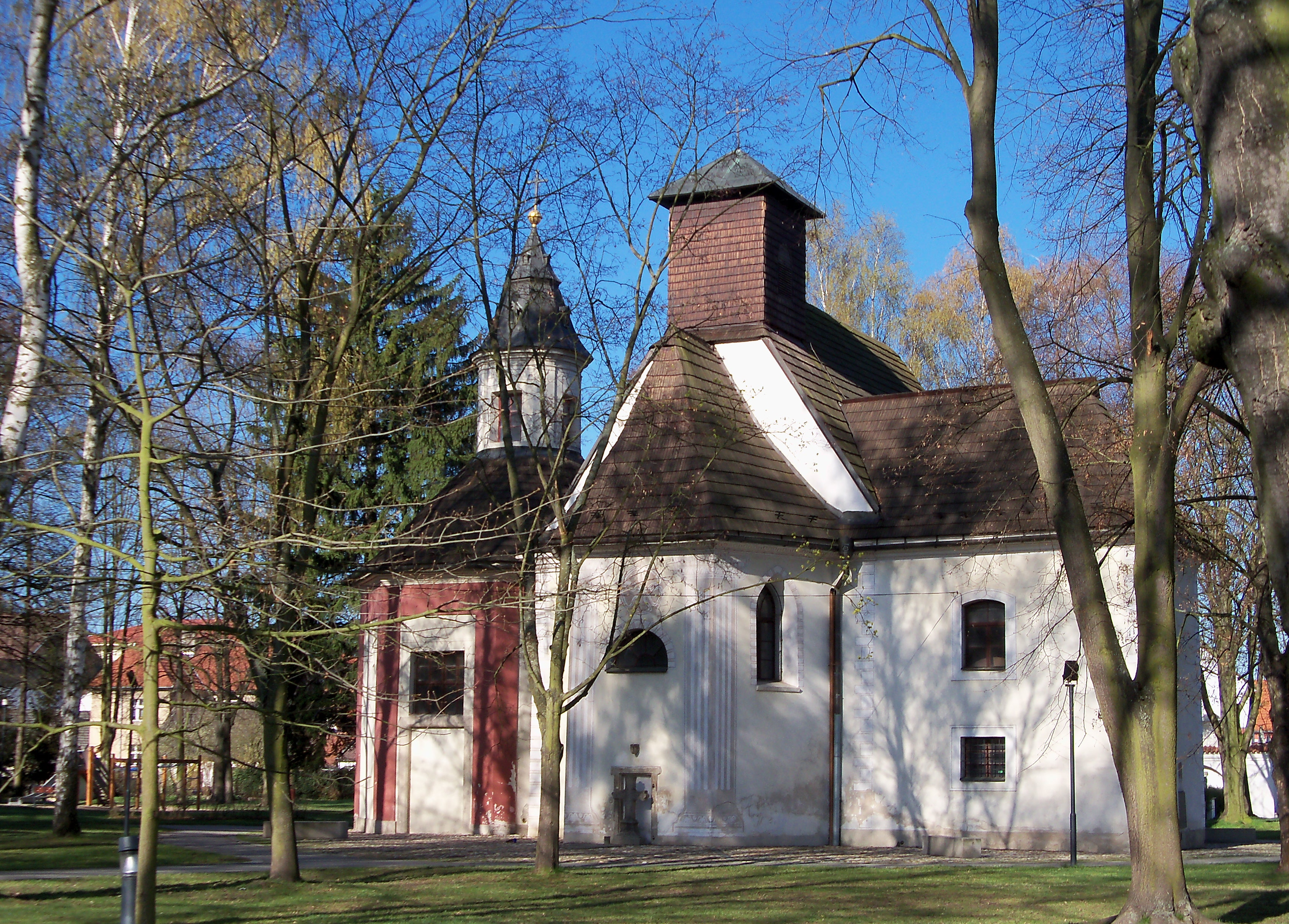 Kostel sv. Marka (Soběslav), Soběslav